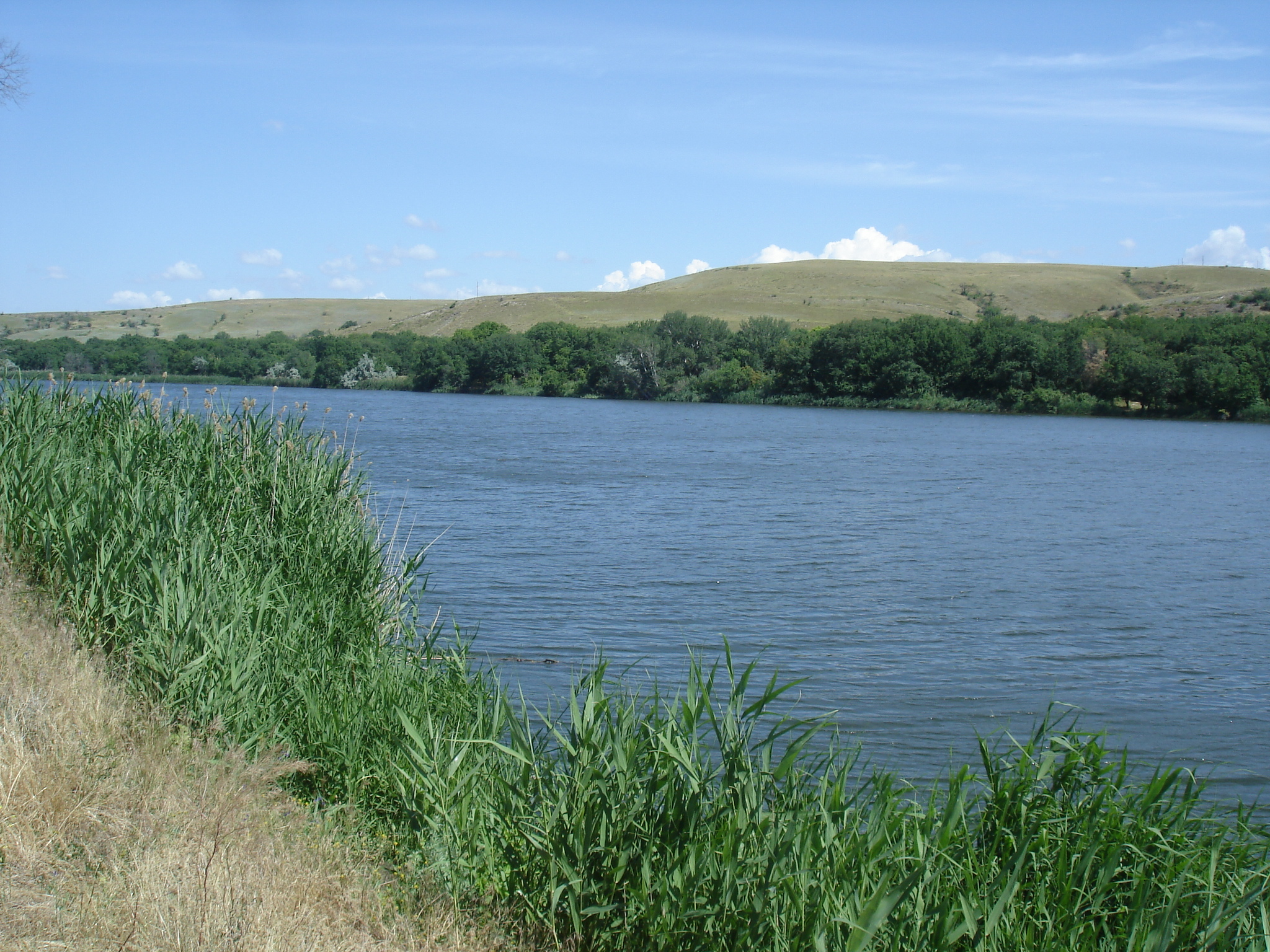 Северский Донец в хуторе Богданов